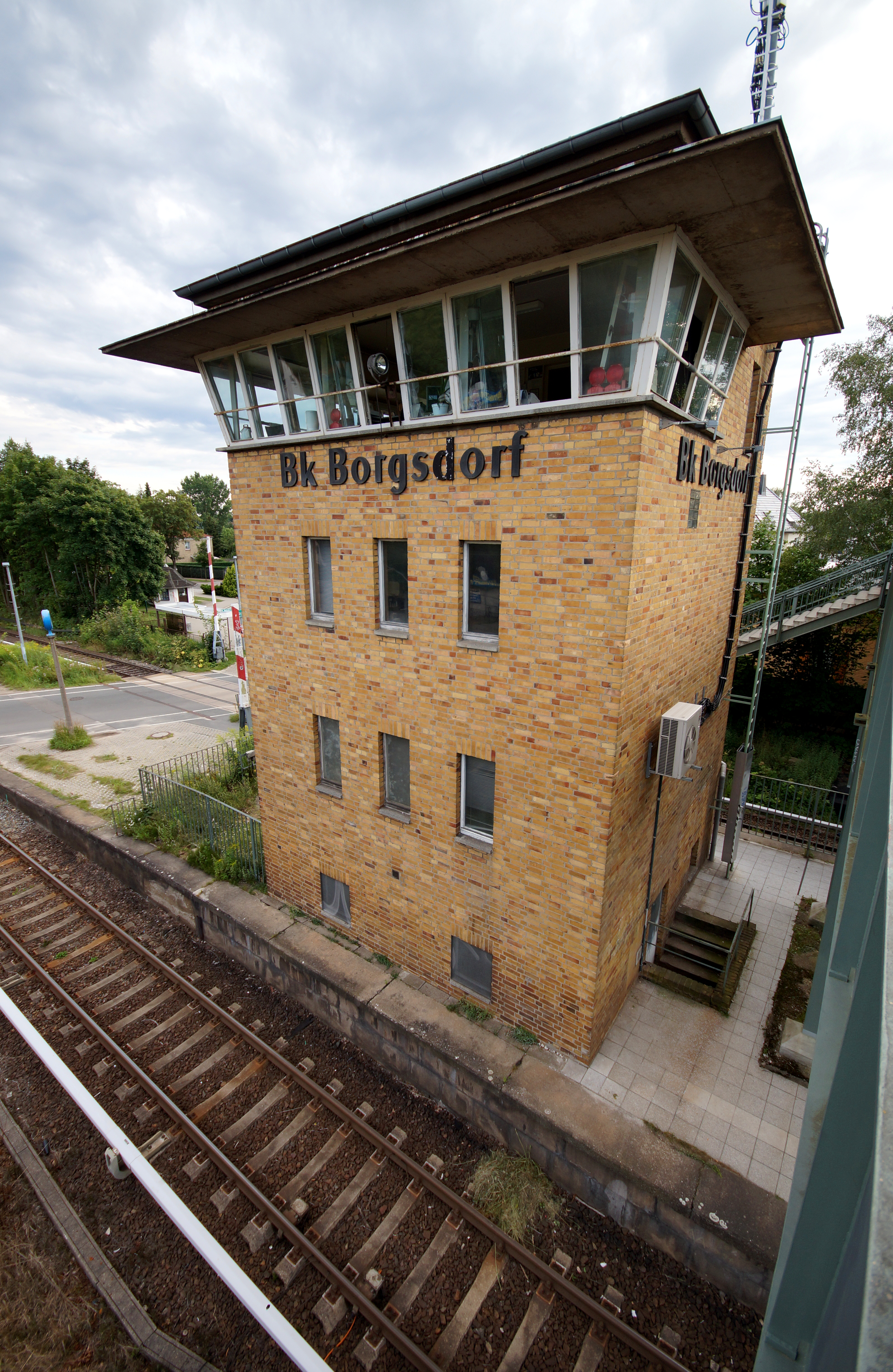 Gebäude der Blockstelle in Borgsdorf in Hohen Neuendorf